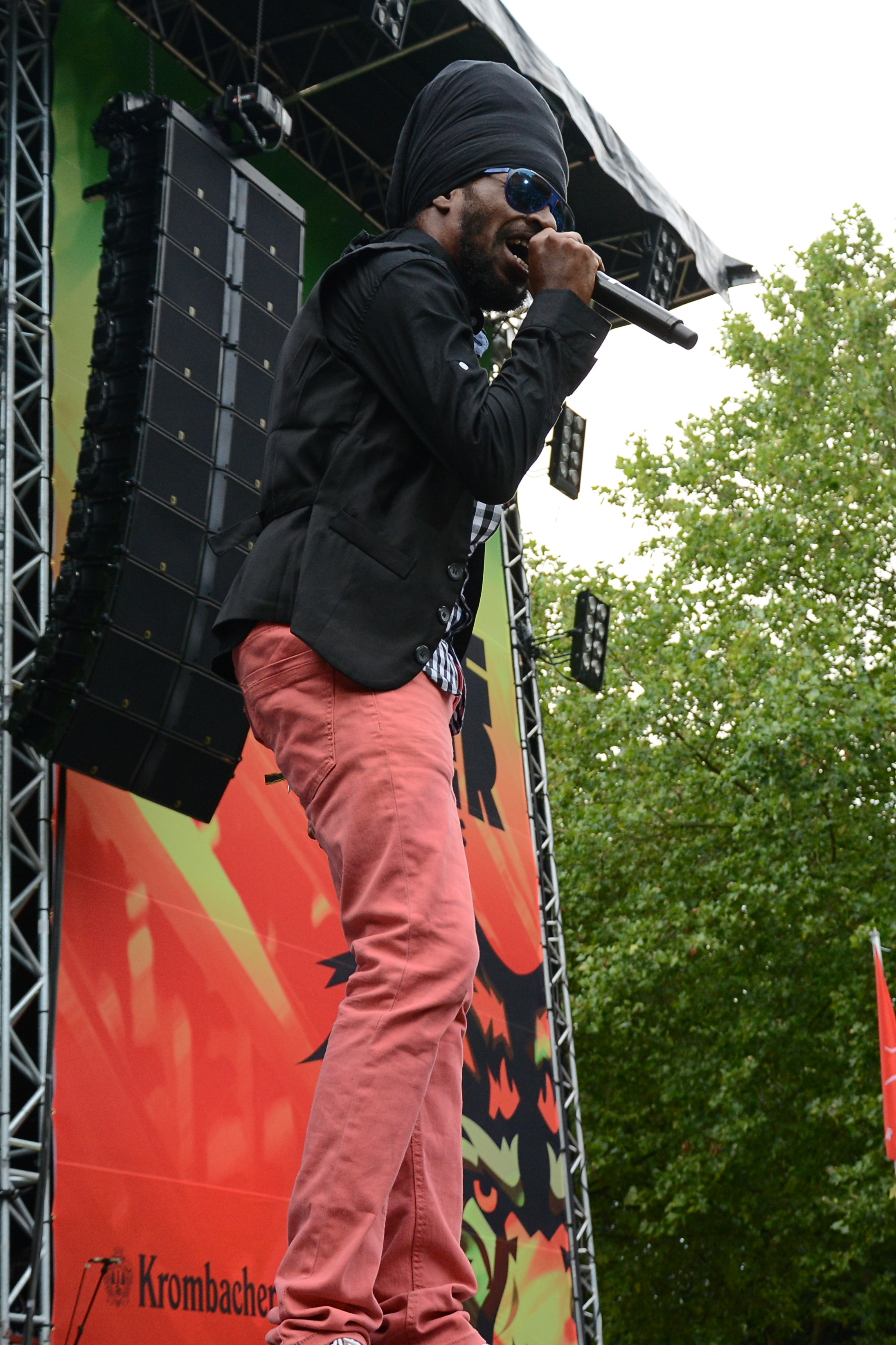 Perfect beim Ruhr Reggae Summer in Mülheim